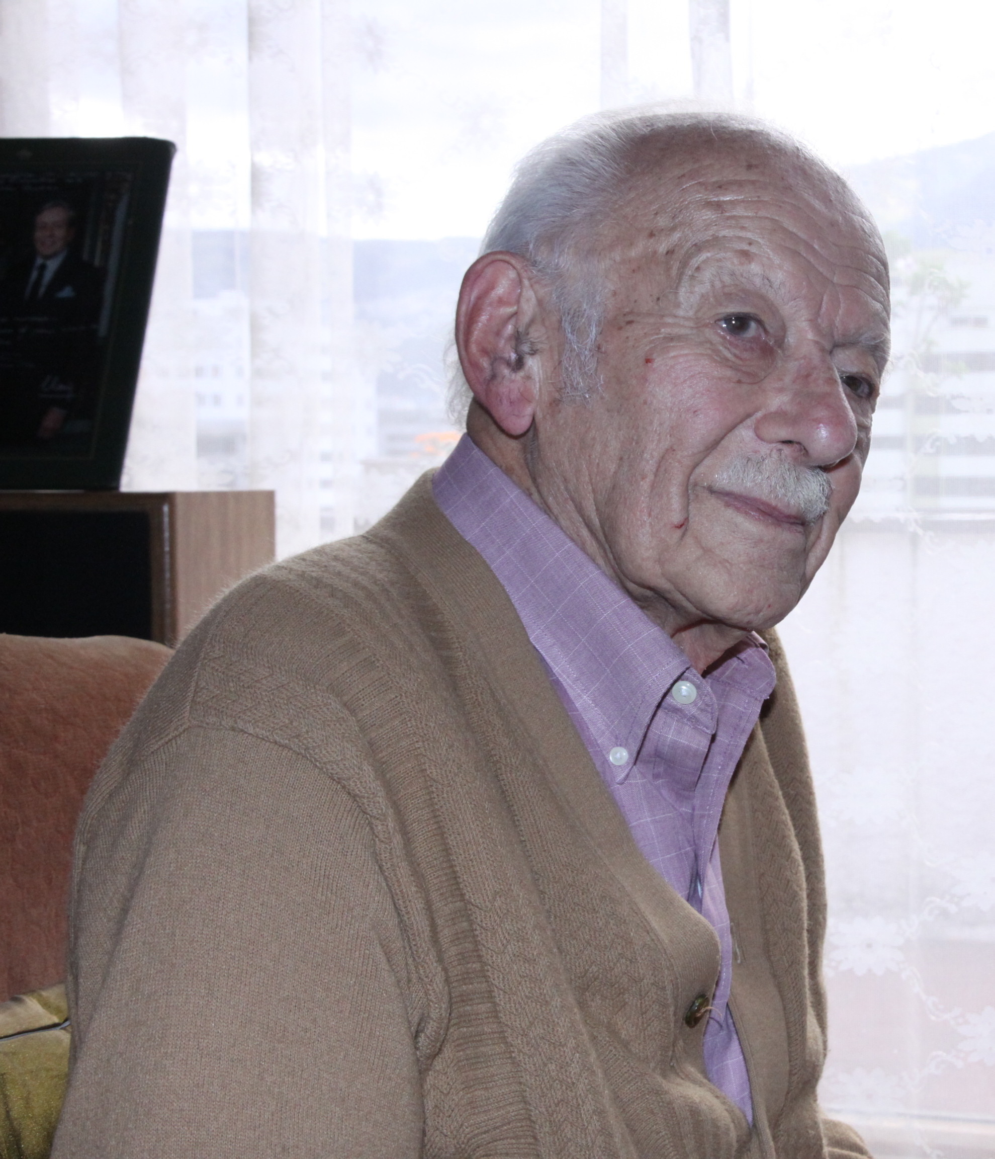 Foto: Hugo Ortiz Ron / Asamblea Nacional